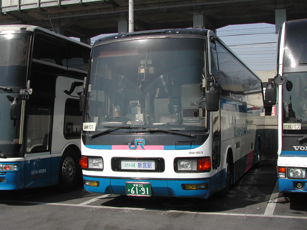 京都営業所にて、許可を得て撮影